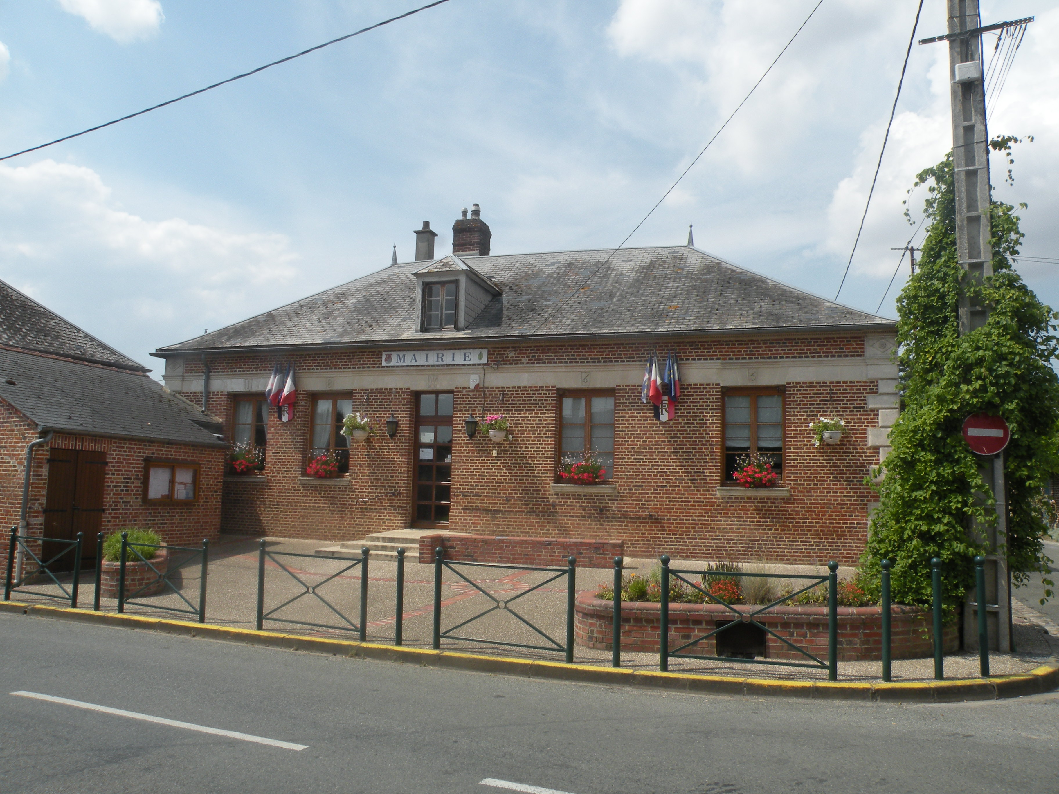 Le Fay-Saint-Quentin mairie